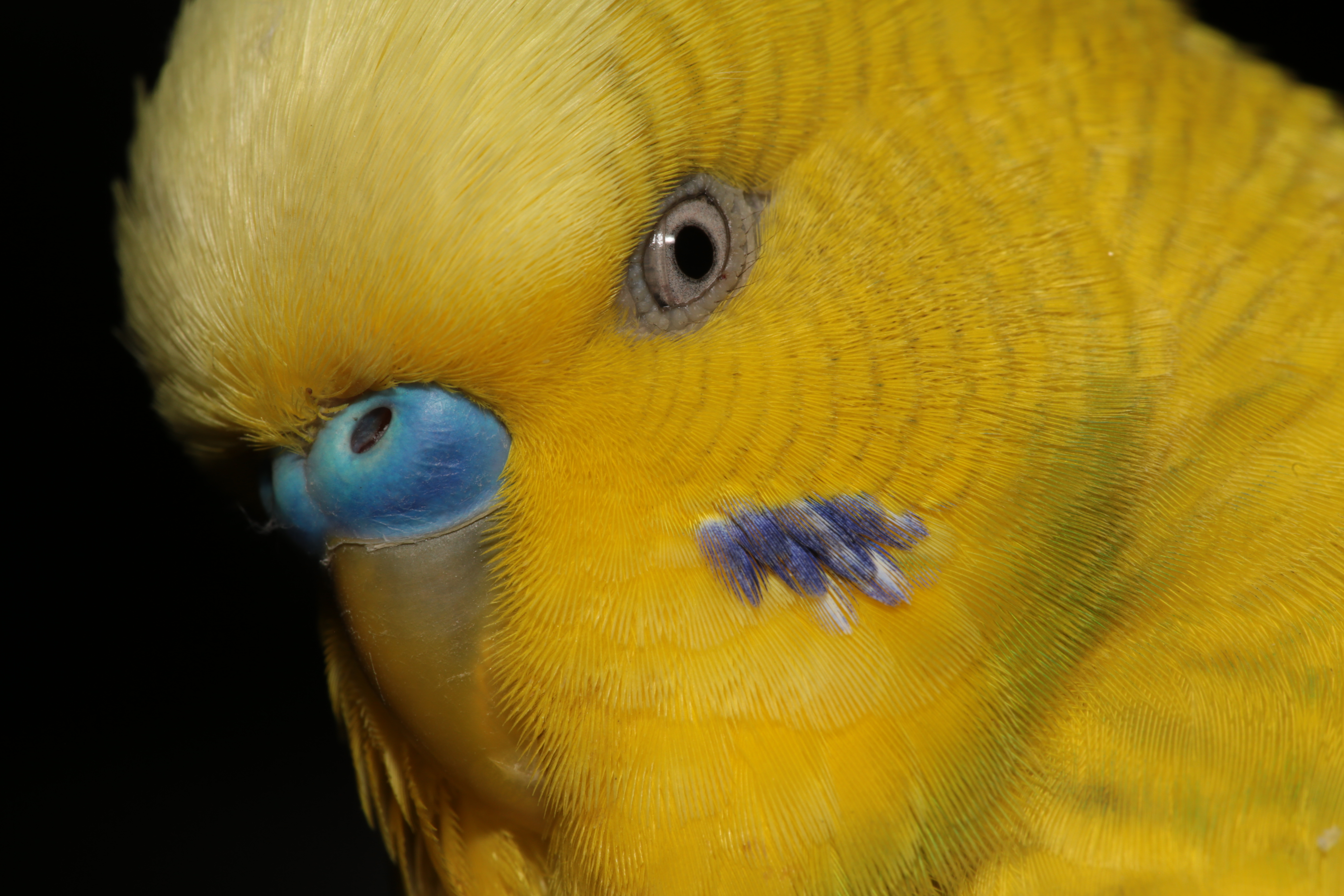 und das selbe mit dem 180L Macro an der EOS 6D